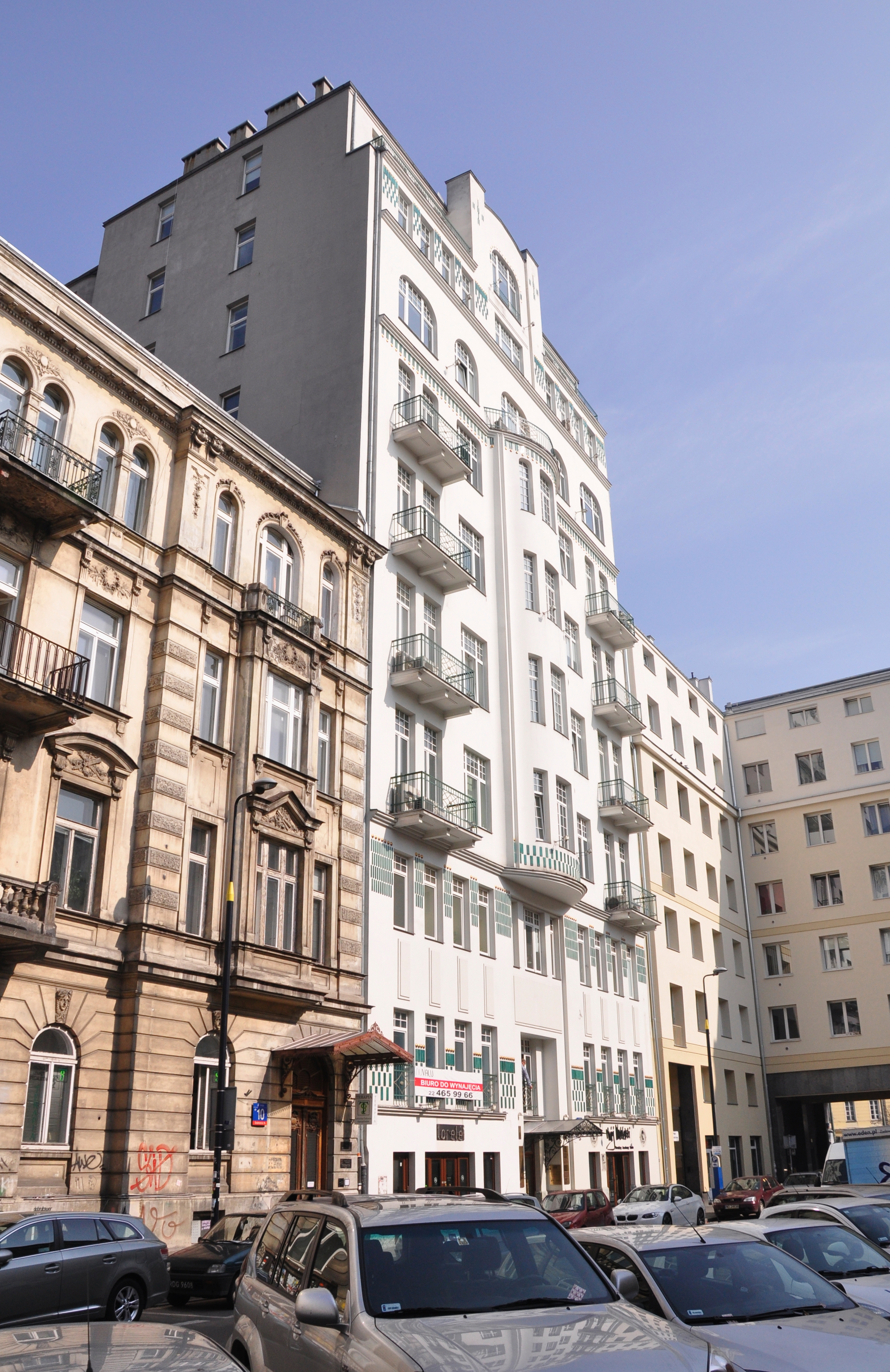 Warschau, ul. Widok 8